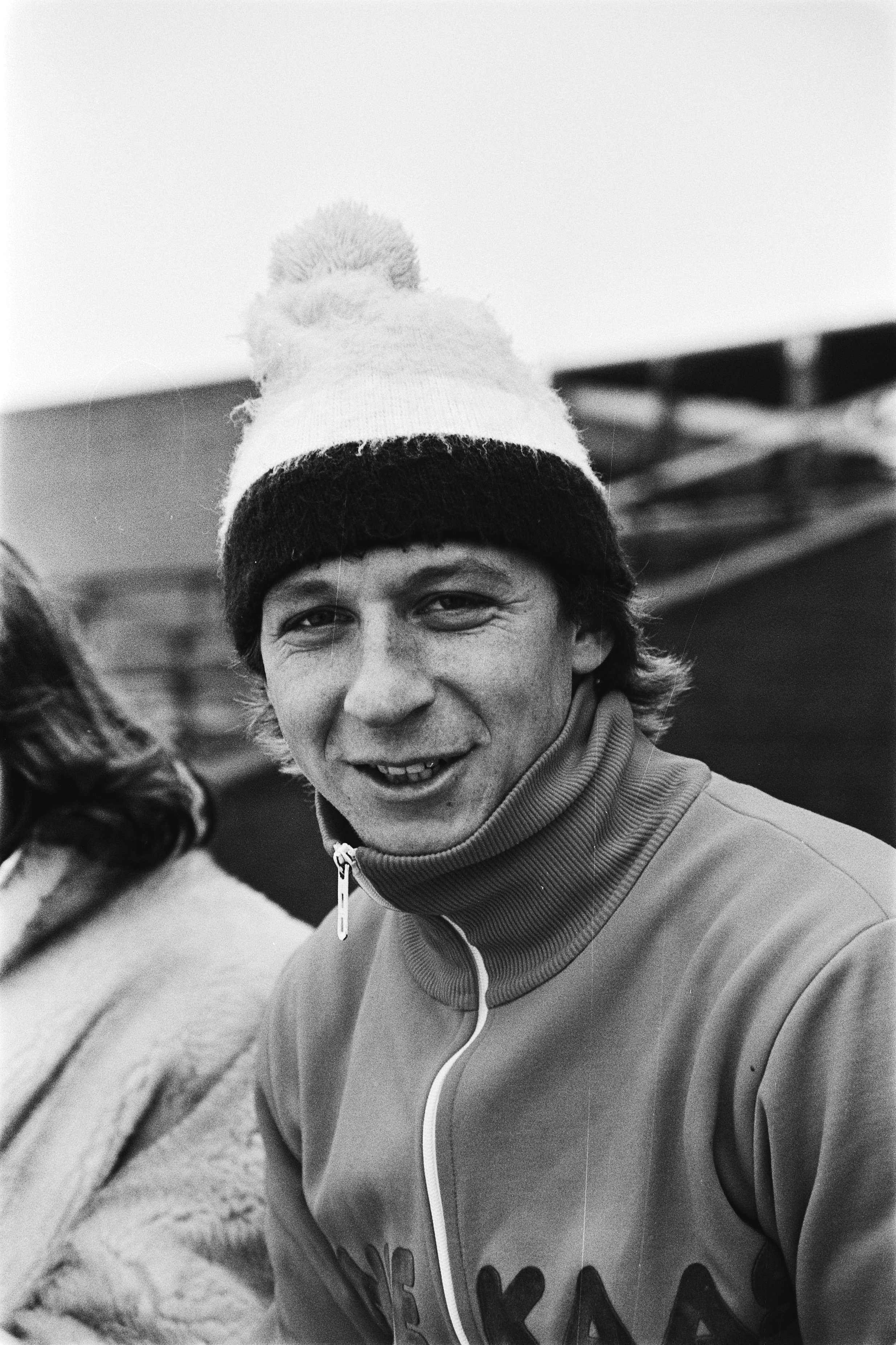 Collectie / Archief : Fotocollectie Anefo Reportage / Serie : [ onbekend ] Beschrijving : Wereldkampioenschappen schaatsen heren allround in Heerenveen. Yep Kramer tijdens de voorbereidende trainingen. Datum : 28 februari 1980 Locatie : Friesland, Heerenveen Trefwoorden : schaatsen, sport Persoonsnaam : Kramer, Yep Fotograaf : Dijk, Hans van / Anefo Auteursrechthebbende : Nationaal Archief Materiaalsoort : Negatief (zwart/wit) Nummer archiefinventaris : bekijk toegang 2.24.01.05 Bestanddeelnummer : 930-6935